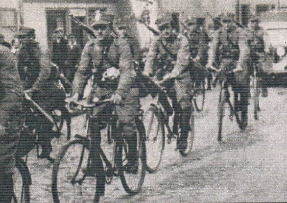 Pluton zwiadu oddziału Obrony Narodowej "Czersk". Oddziału Obrony Narodowej tworzono spośród mężczyzn nie objętych poborem i rezerwistów. Choć miały wykonywać zadania drugorzędne, w czasie kampanii wrześniowej wzięły udział w bezpośrednich walkach.